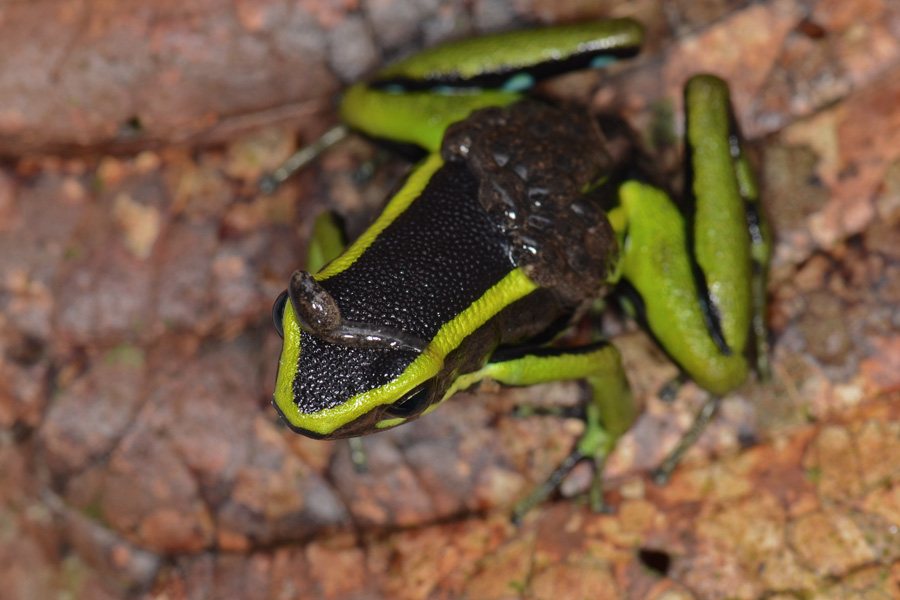 Dendrobatidae: Ameerega trivittata Los Amigos Conservation Concession, Madre de Dios, Peru